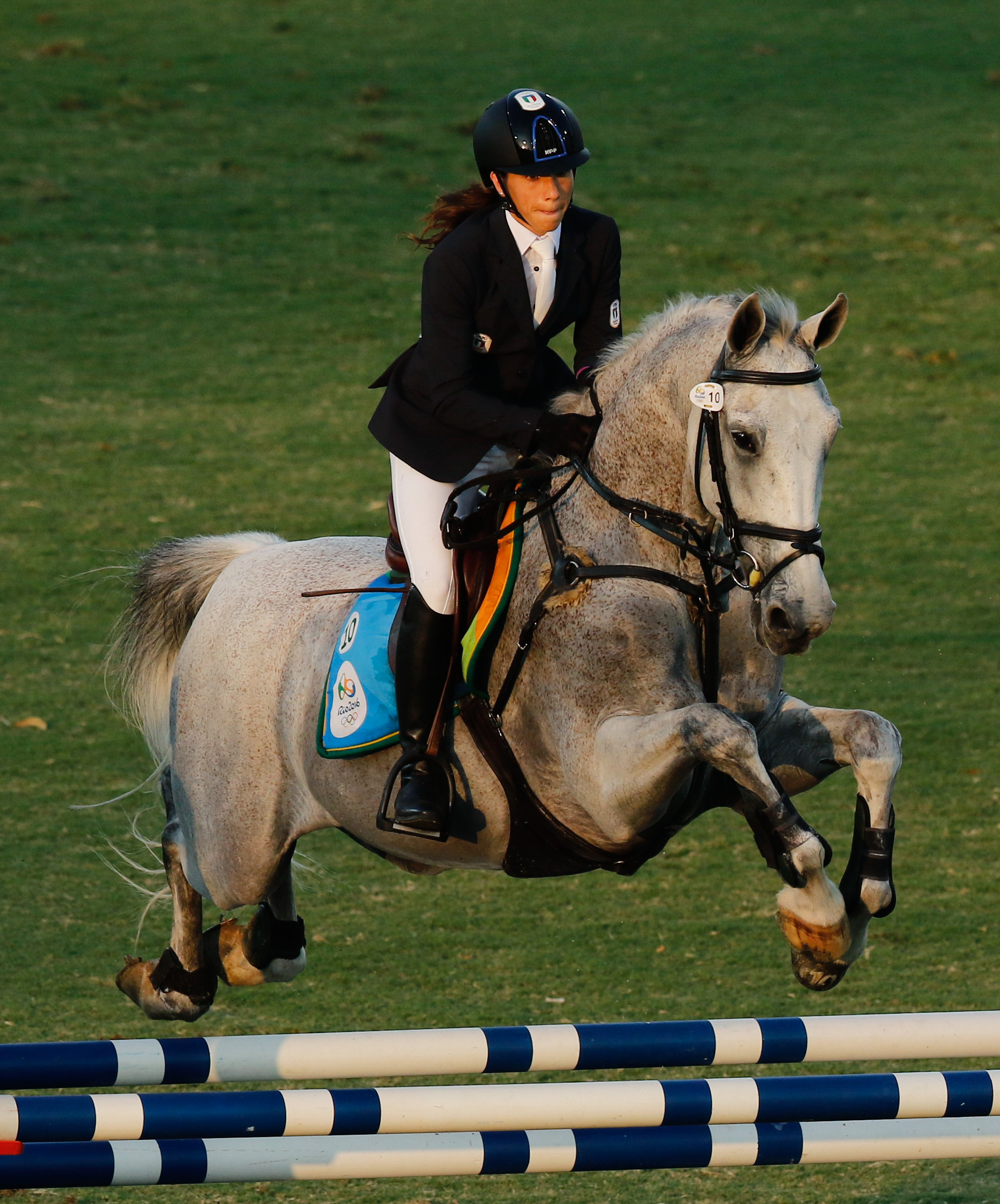 Rio de Janeiro - Italiana Alice Sotero na final do pentatlo moderno dos Jogos Olímpicos Rio 2016 no Estádio de Deodoro (Fernando Frazão/Agência Brasil)